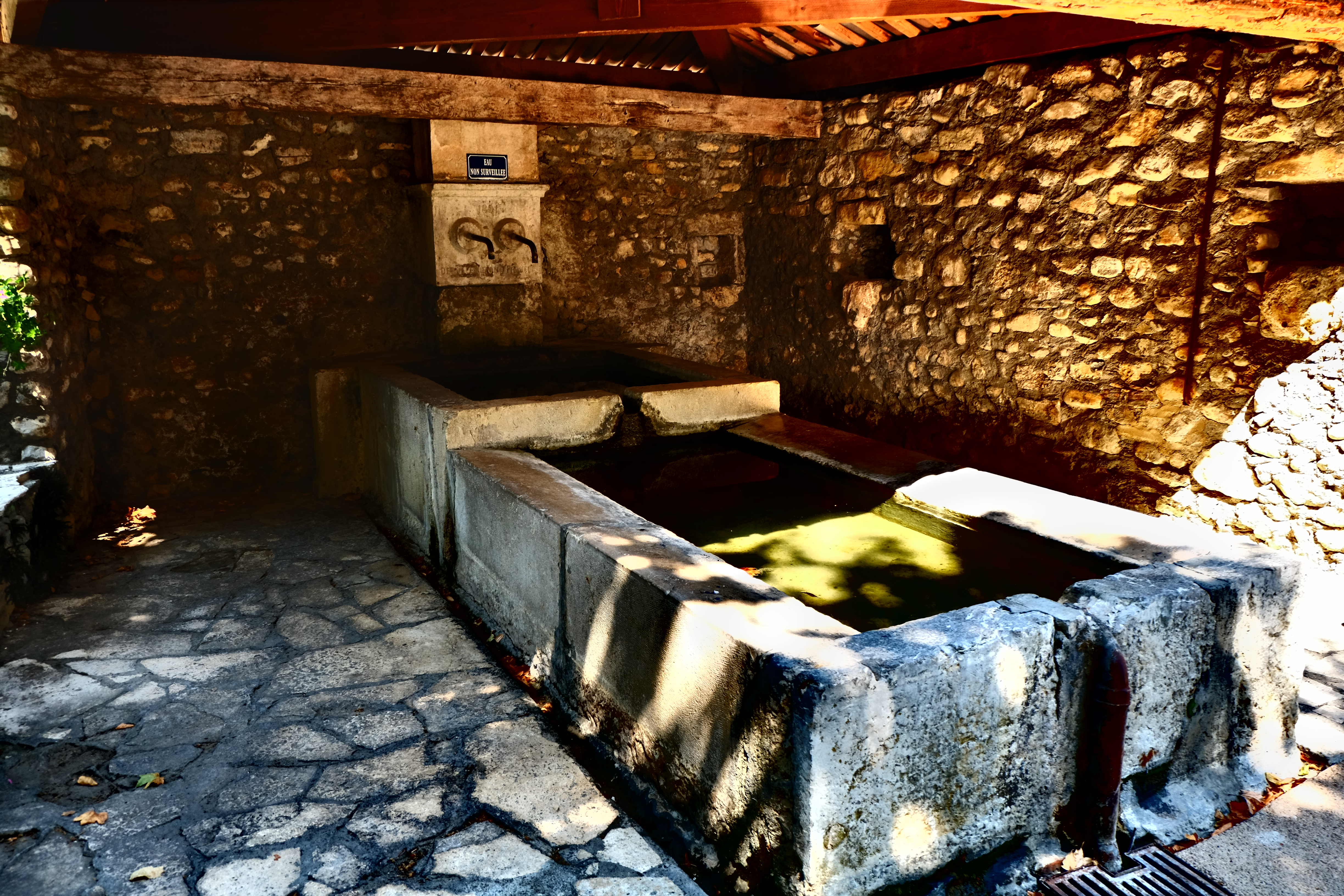 Lavoir de la place du village de Champtercier. Il en existe un autre, plus ancien, dans le village